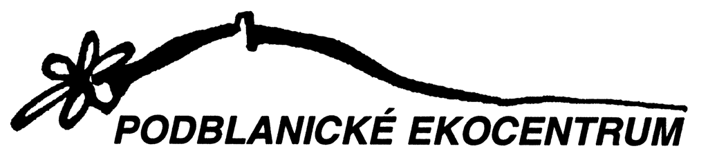 Logo vlašimského ekocentra